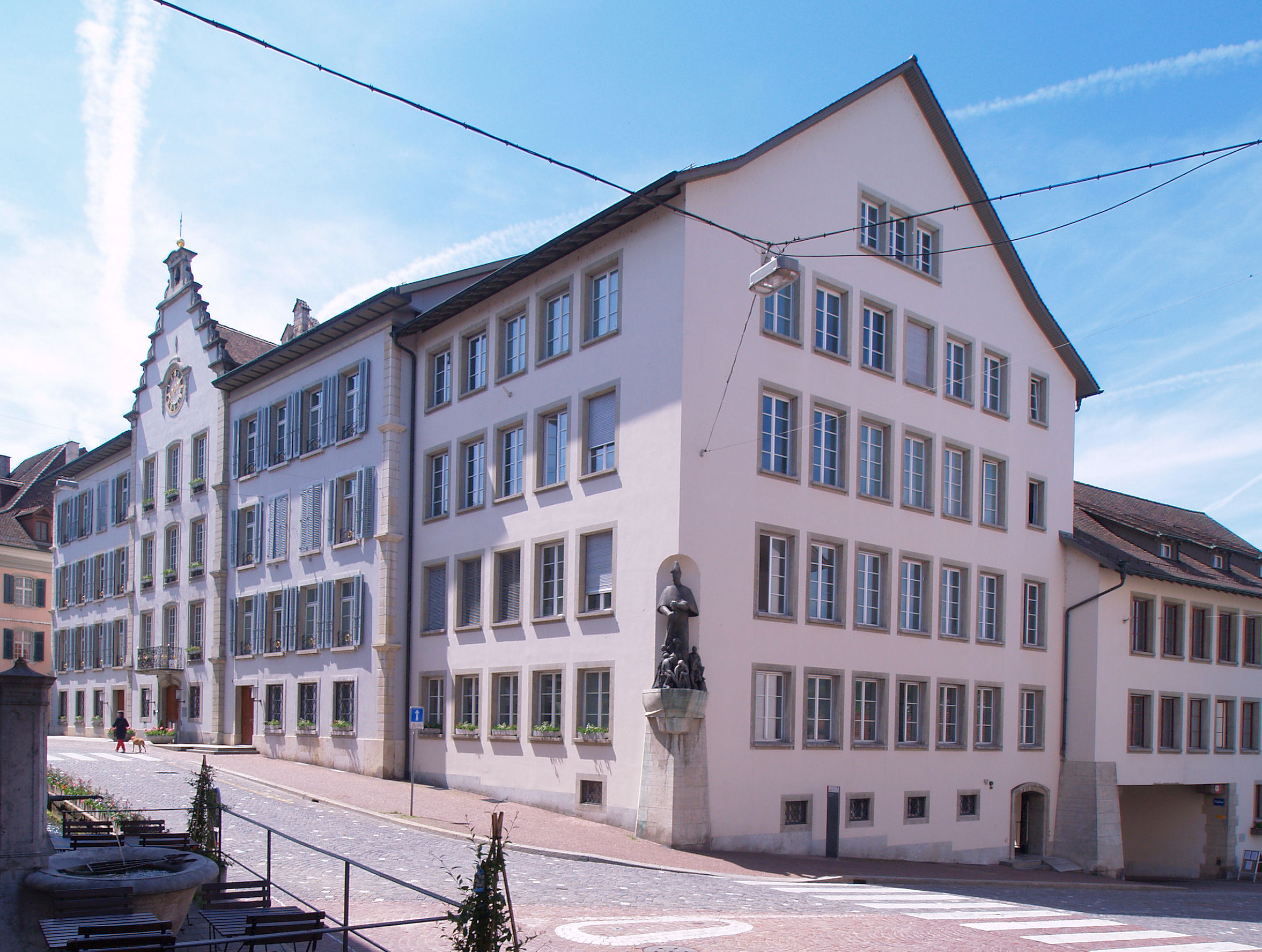 Das Rathaus der Stadt Aarau